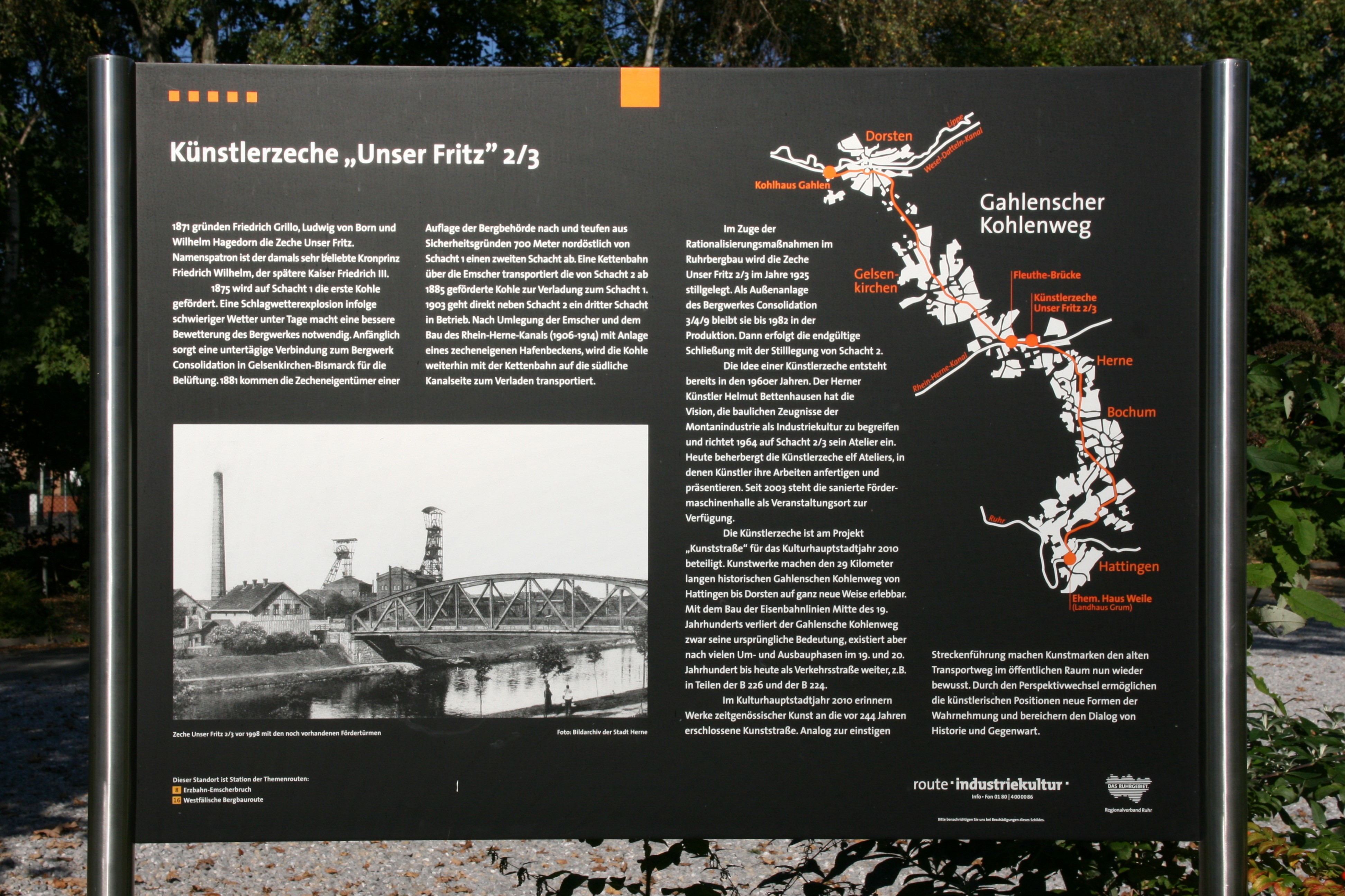 Künstlerzeche Unser Fritz 2/3, Dorstener Straße in Herne